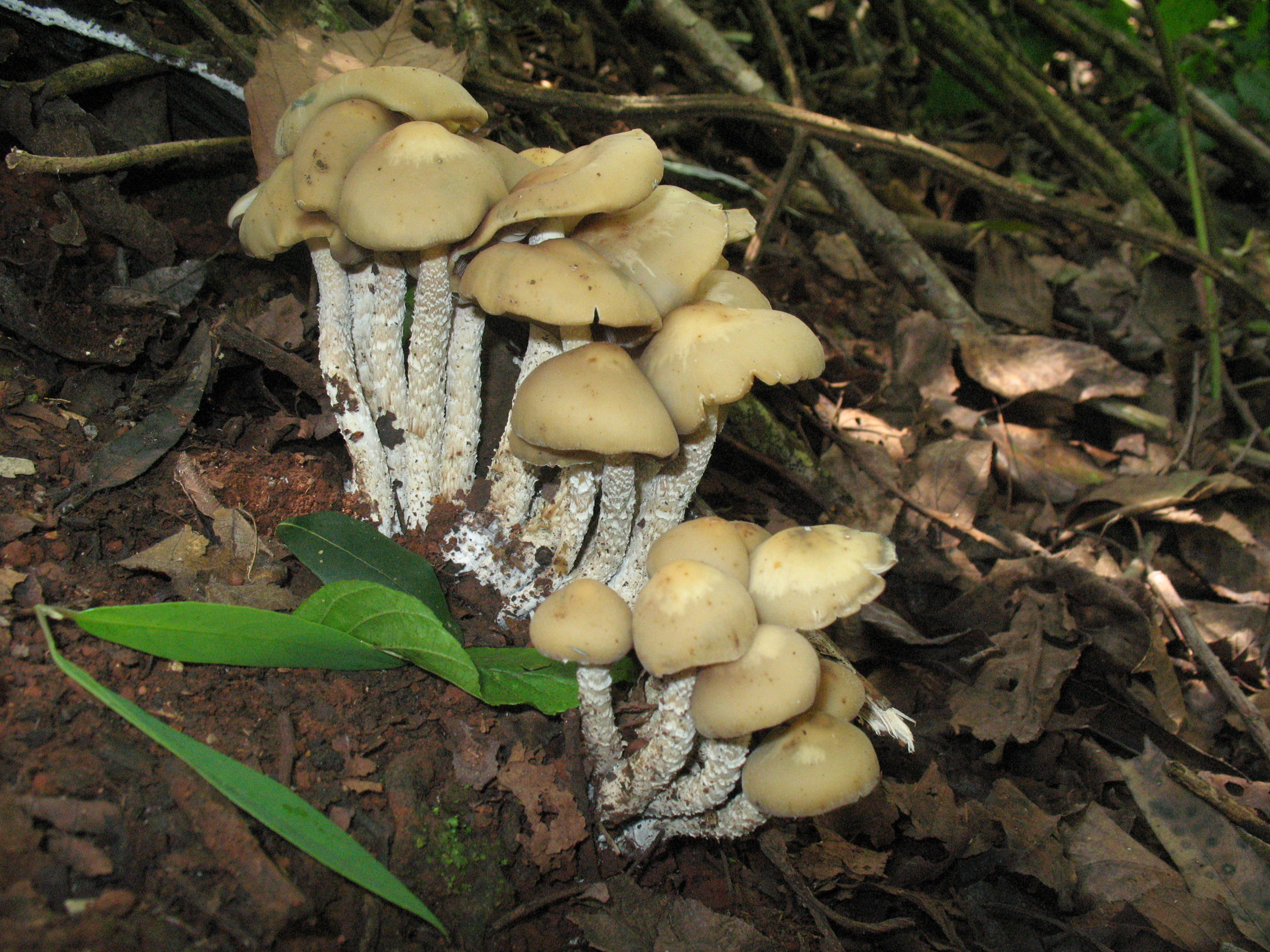 Psilocybe zapotecorum. Jalisco, Mexico.